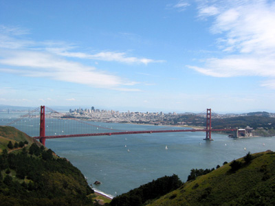 透過金門大橋遙望舊金山市中心 舊金山是個建築在半島狀山丘地形上的城市，由於腹地狹小人口密集，市區內地形起伏非常大。 本圖片由上傳者zh:User:SElephant拍攝於2003年4月。